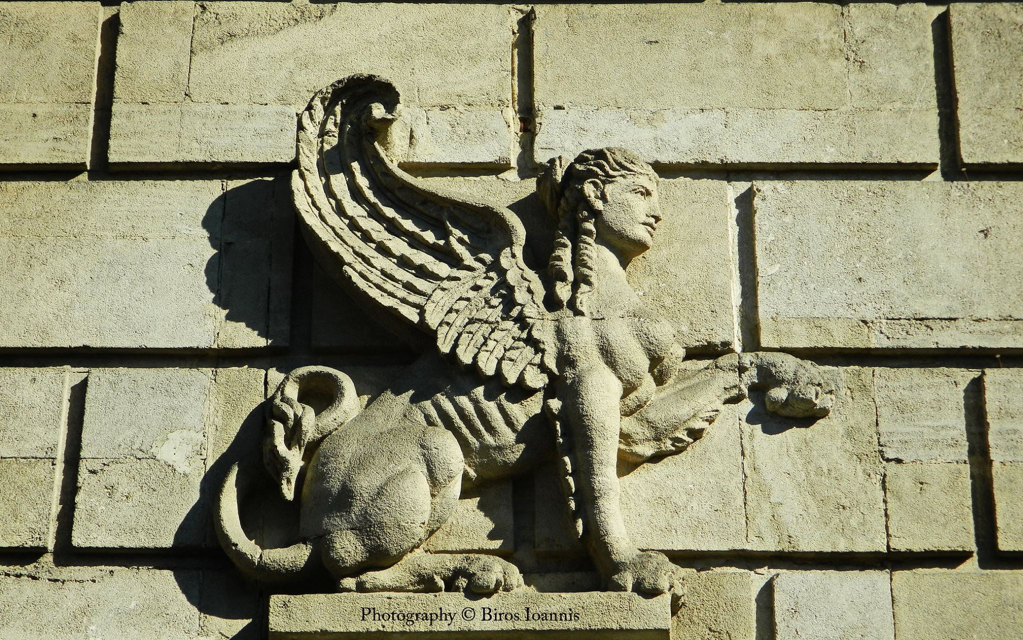 Ζωγραφειον Λυκειο η Σφιγγα σημα του Ζωγραφειου Λυκειου